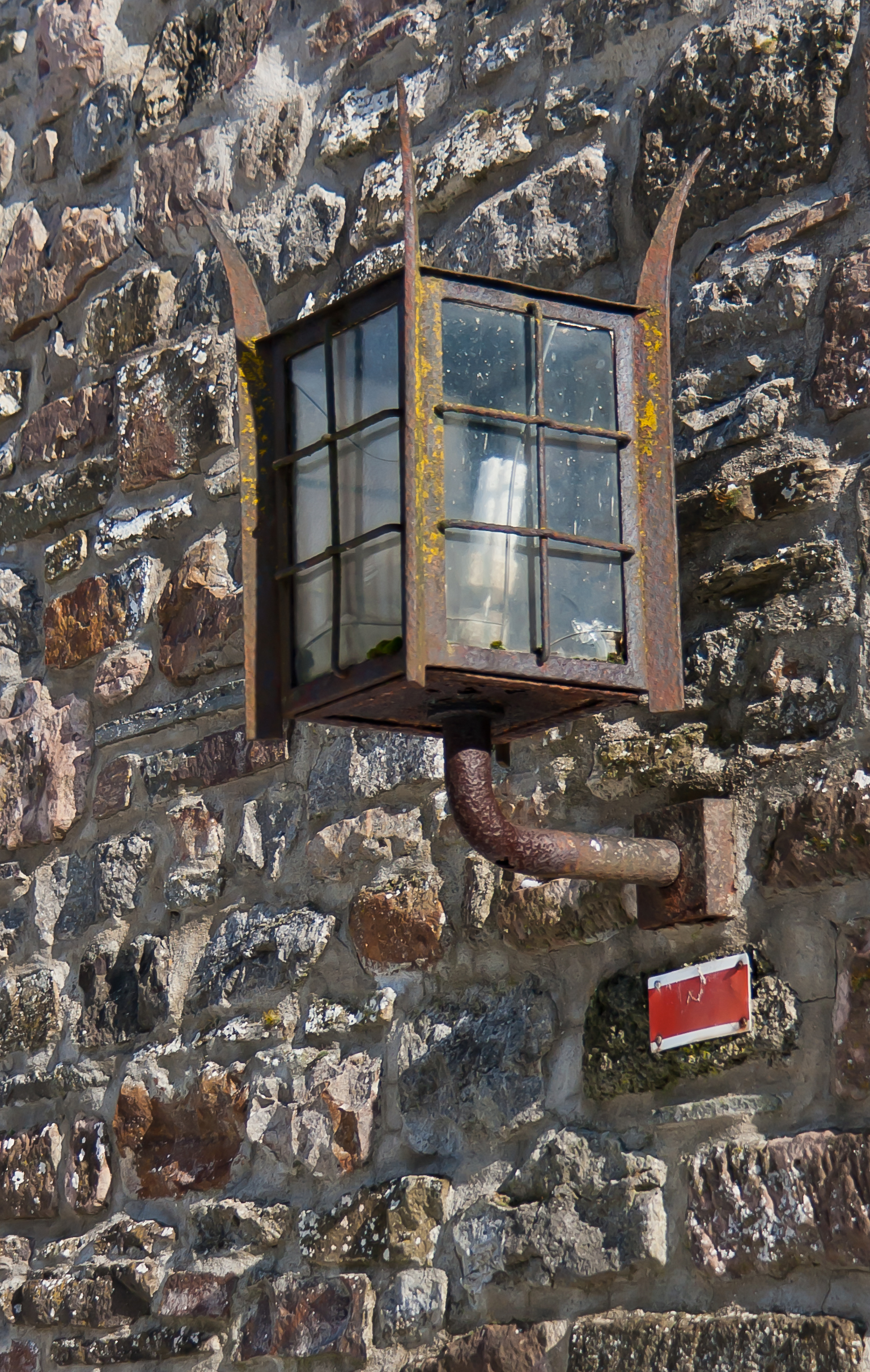 Straßenlaterne an einer Hauswand in Kronenburg (Dahlem). Unterhalb der Laterne ist ein „Laternenring“ in Form eines rechteckigen Schildes angebracht. Es handelt sich um das deutsche Verkehrszeichen 394. Damit werden innerhalb geschlossener Ortschaften Laternen gekennzeichnet, die nicht die ganze Nacht eingeschaltet sind.